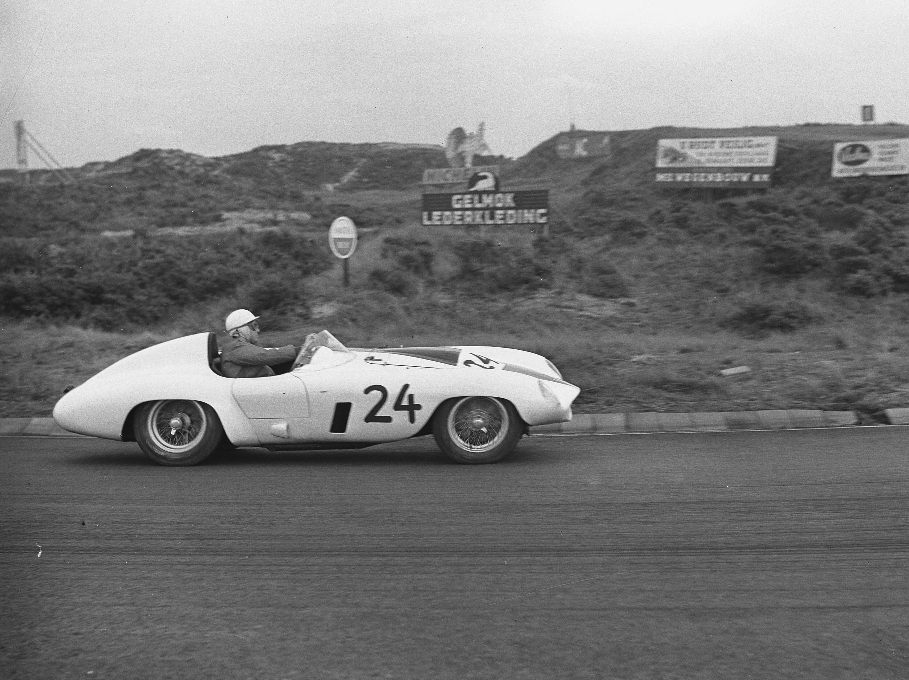 Collectie / Archief : Fotocollectie Anefo Reportage / Serie : [ onbekend ] Beschrijving : Trainingsdag sportwagenraces Zandvoort. Amerikaan Boris '"Bob" Said in Ferrari Mondial , deze bereikte grote snelheden Datum : 13 augustus 1954 Locatie : Noord-Holland, Zandvoort Trefwoorden : autosport Persoonsnaam : Said, Boris Robert Fotograaf : Bilsen, Joop van / Anefo Auteursrechthebbende : Nationaal Archief Materiaalsoort : Glasnegatief Nummer archiefinventaris : bekijk toegang 2.24.01.09 Bestanddeelnummer : 906-6635